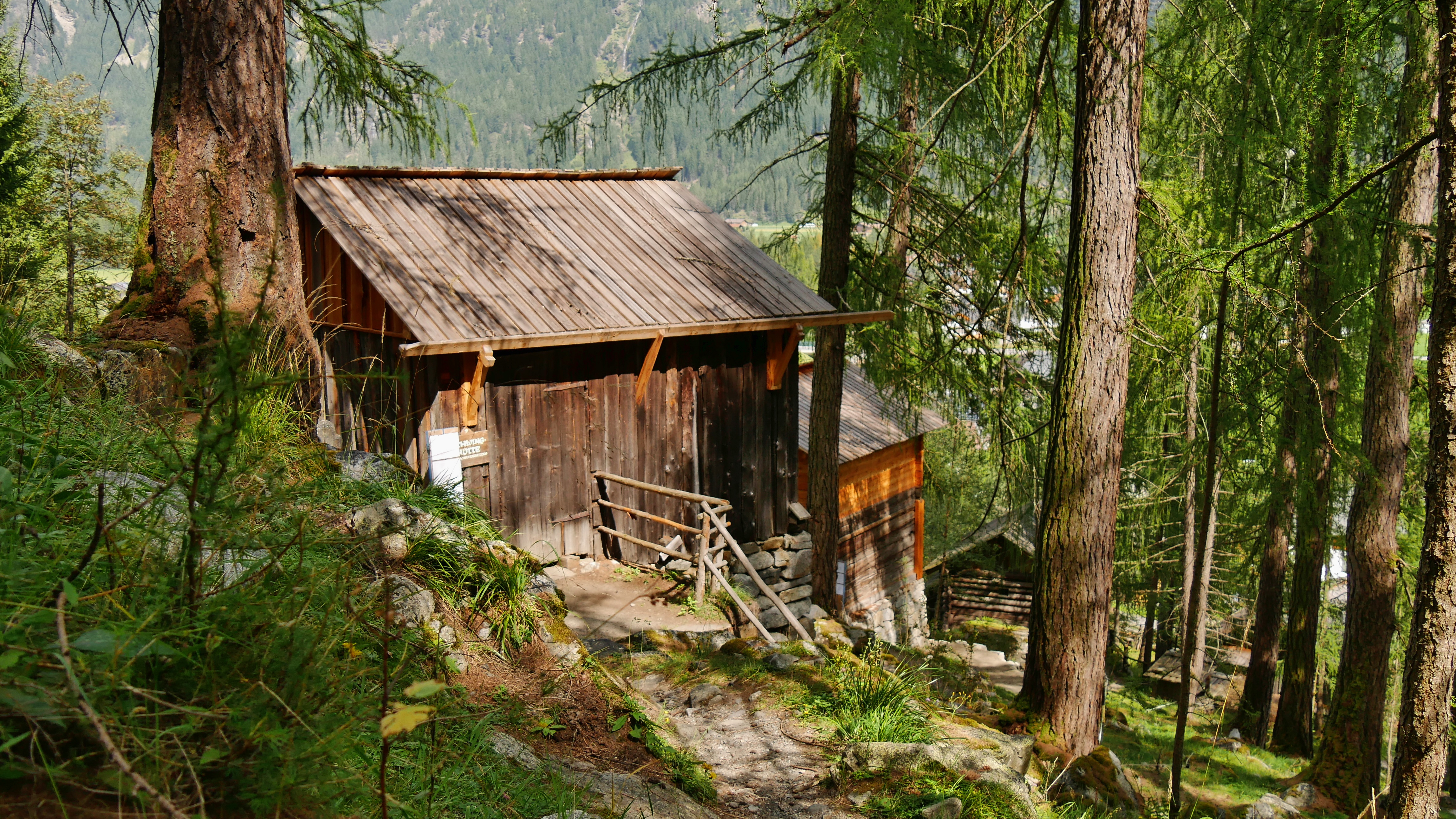 Ötztaler Freilichtmuseum, Längenfeld Ötztal/Tirol - Wassergetriebene Flachs-Schwinghütte, Kornmühle, Sägemühle (von links)